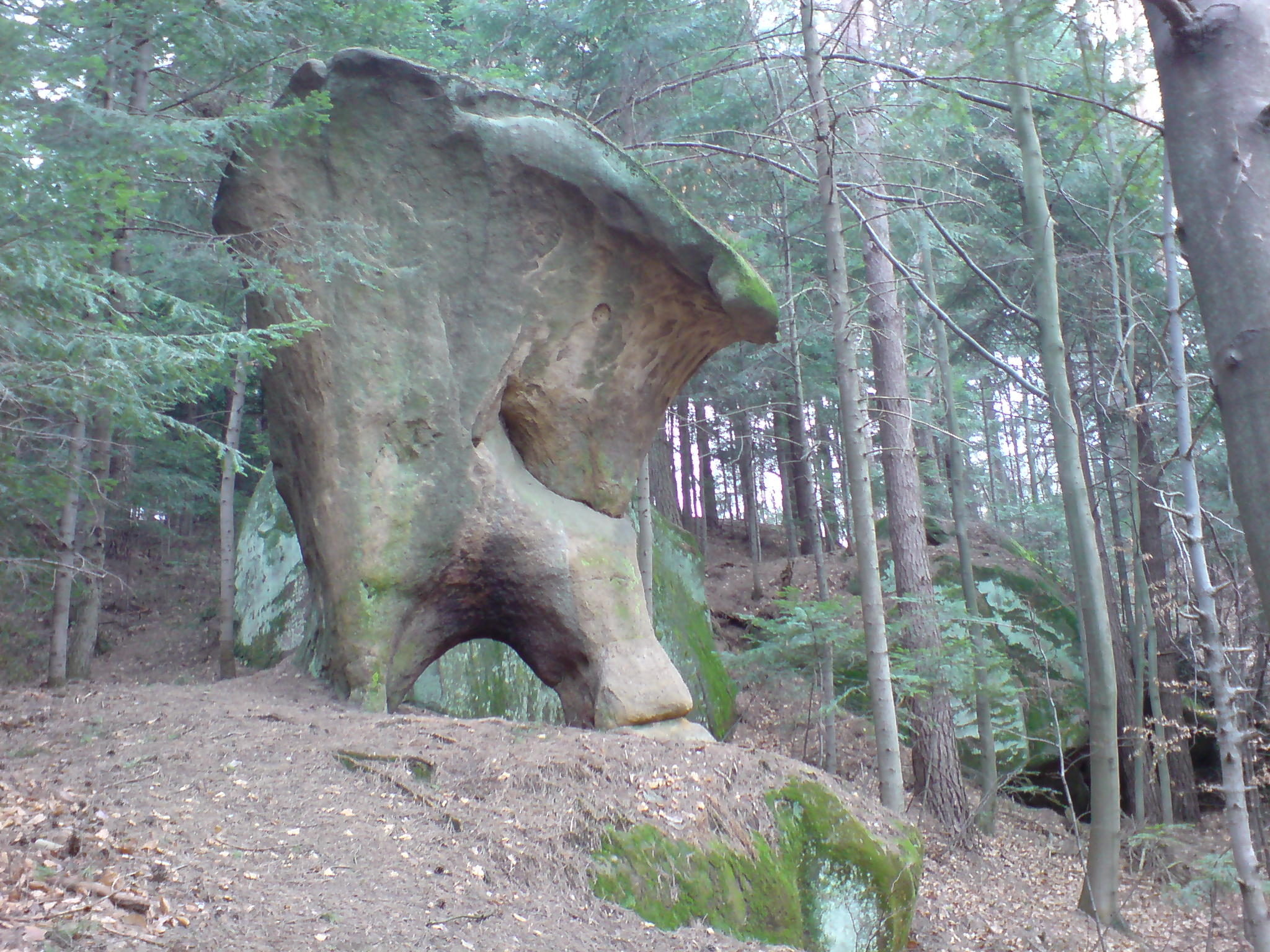 Skała Konfederatka